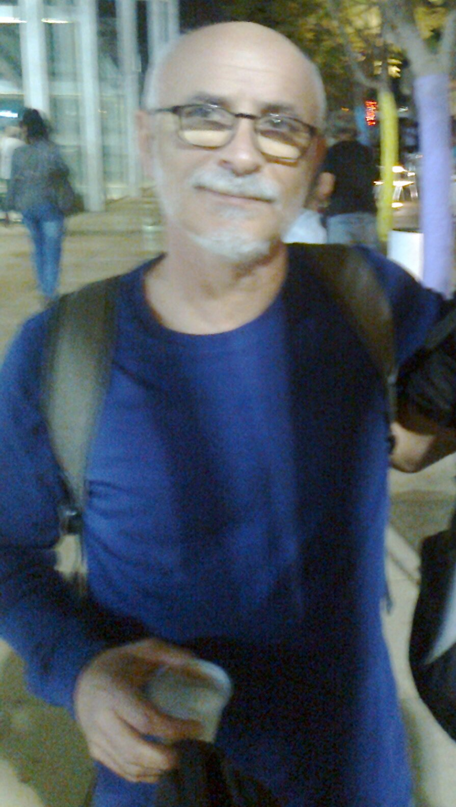 יעקב כהן